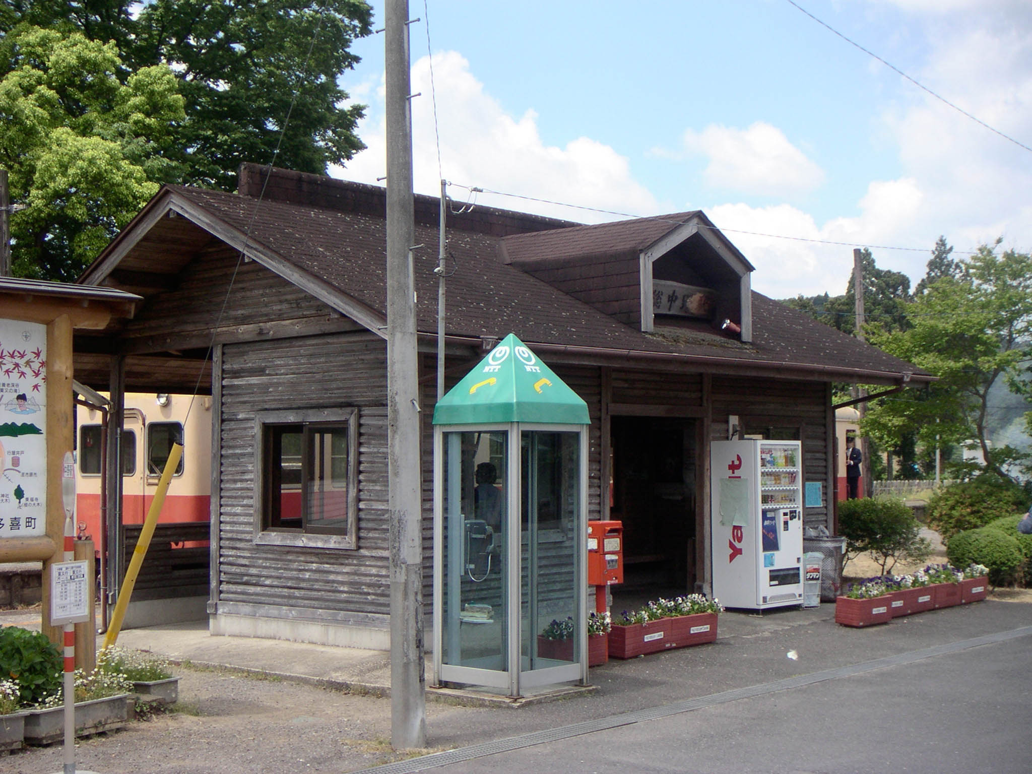 Kazusanakano Station Source: ph by っ May 2005